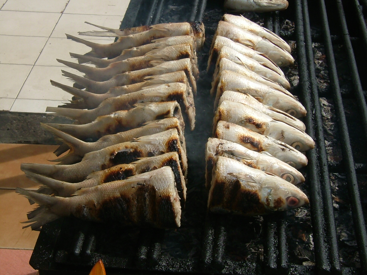 サバヒー Grilled milkfish (ikan bandeng) in Jakarta, Indonesia